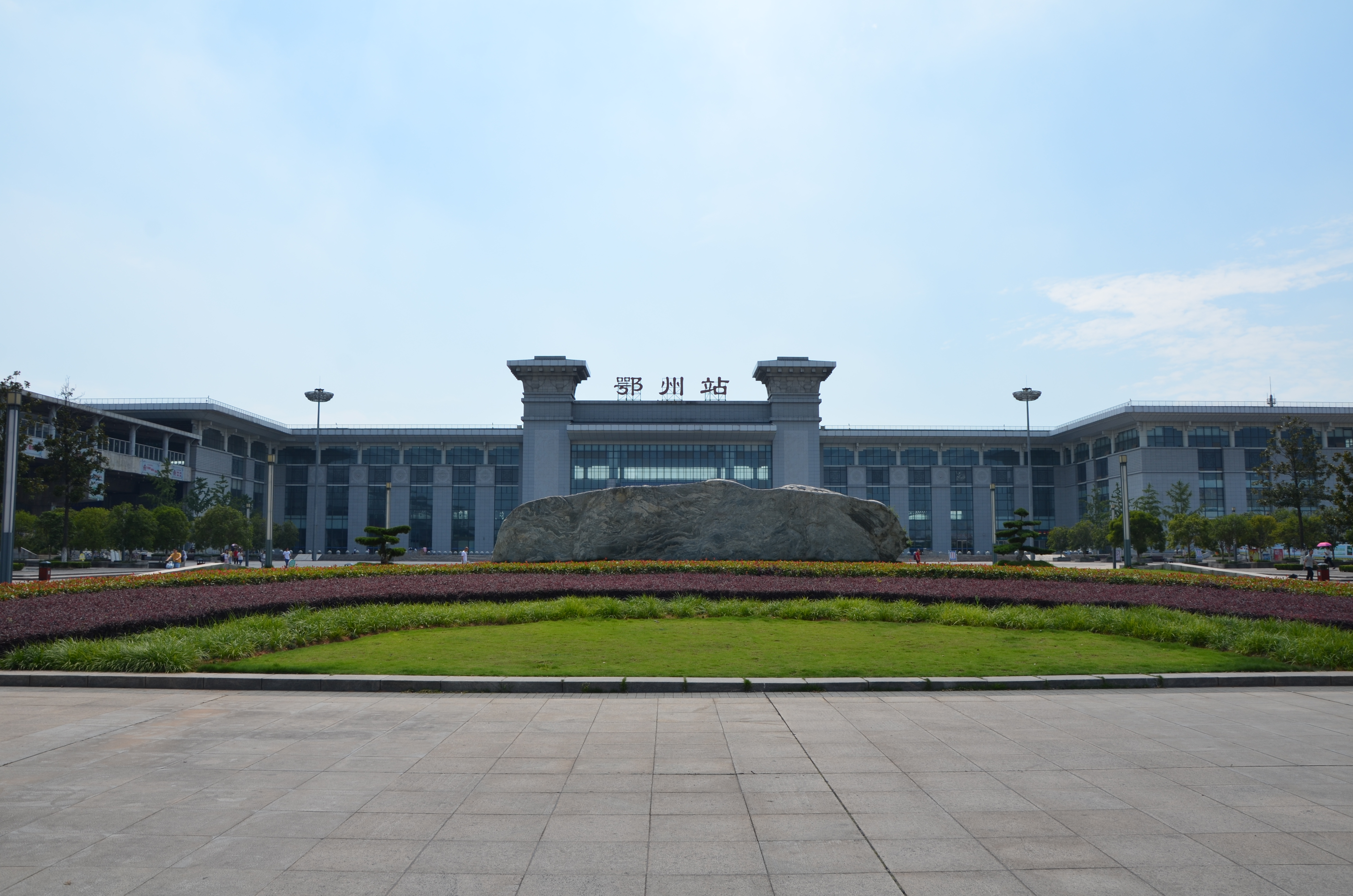 改造后的鄂州站，左侧上跨普速场的是武九客专